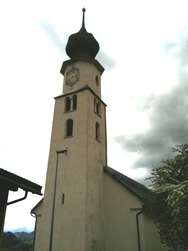 Kirchturm der reformierten Kirche Fanas, Kanton Graubünden